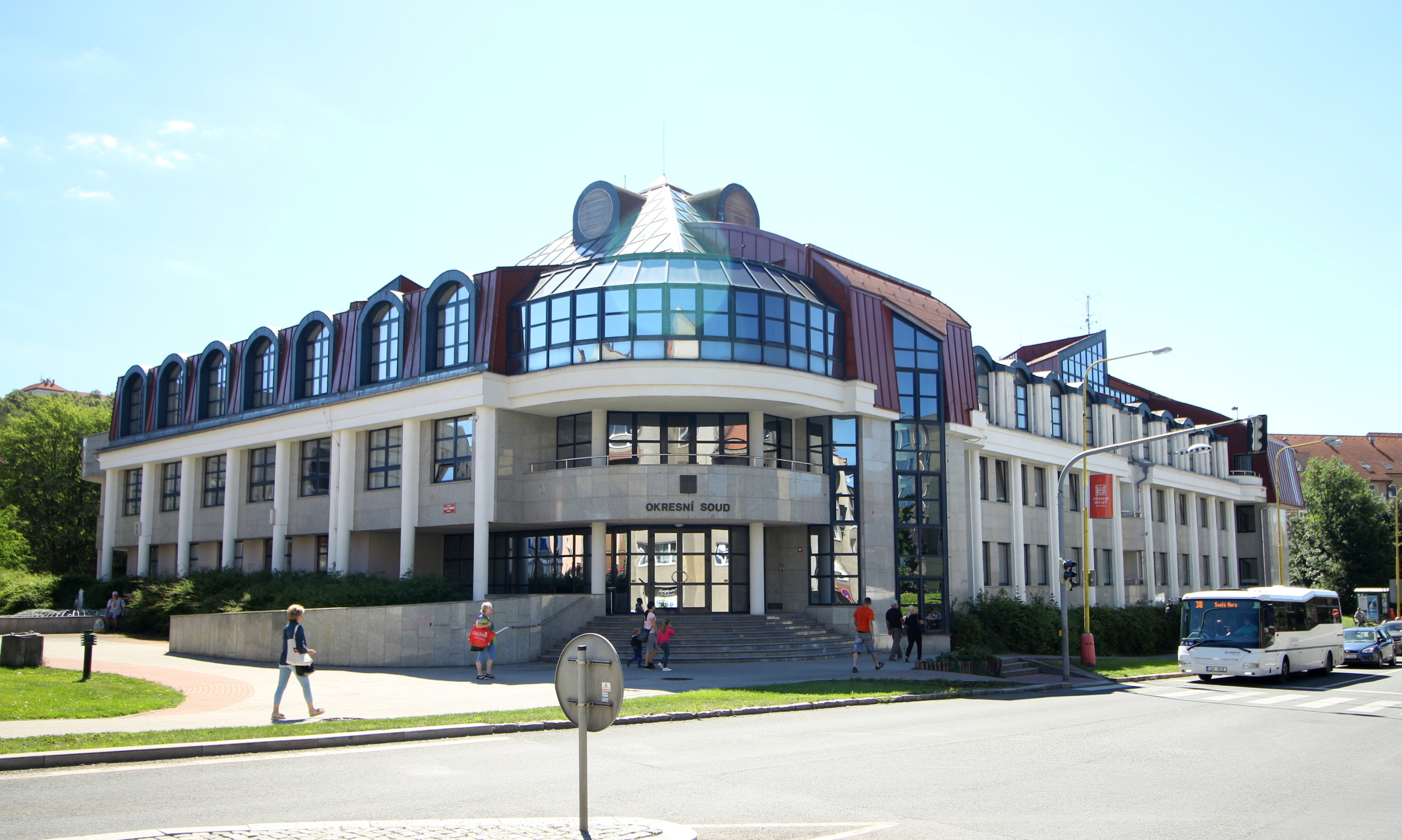 Příbram Okresní soud